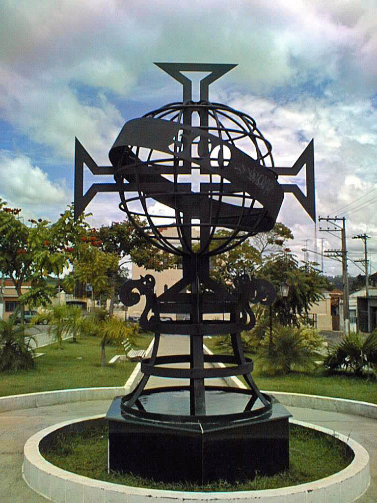 Monumento em Porto Feliz - São Paulo, Brasil.